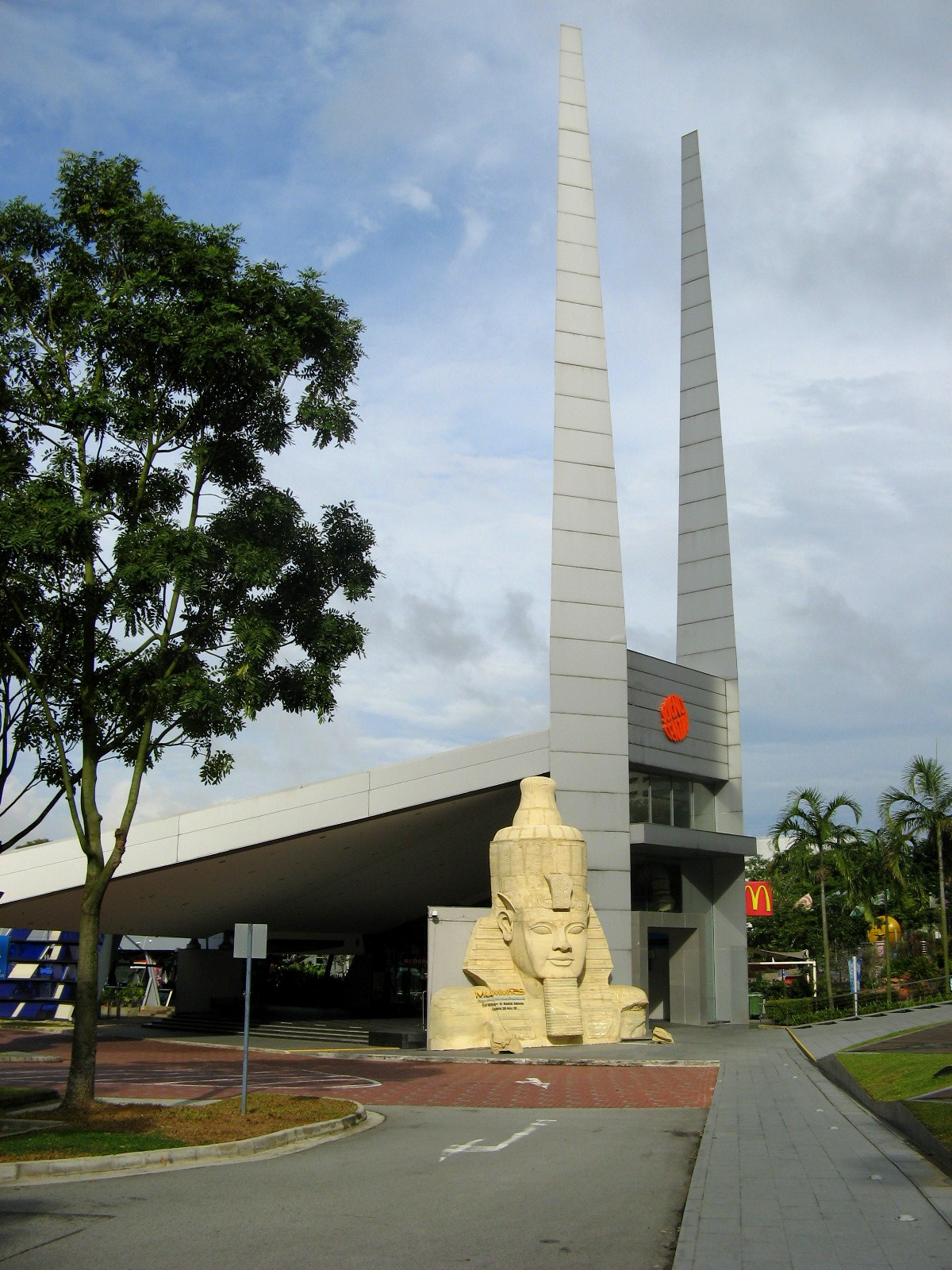 Singapore Science Centre - entrance.